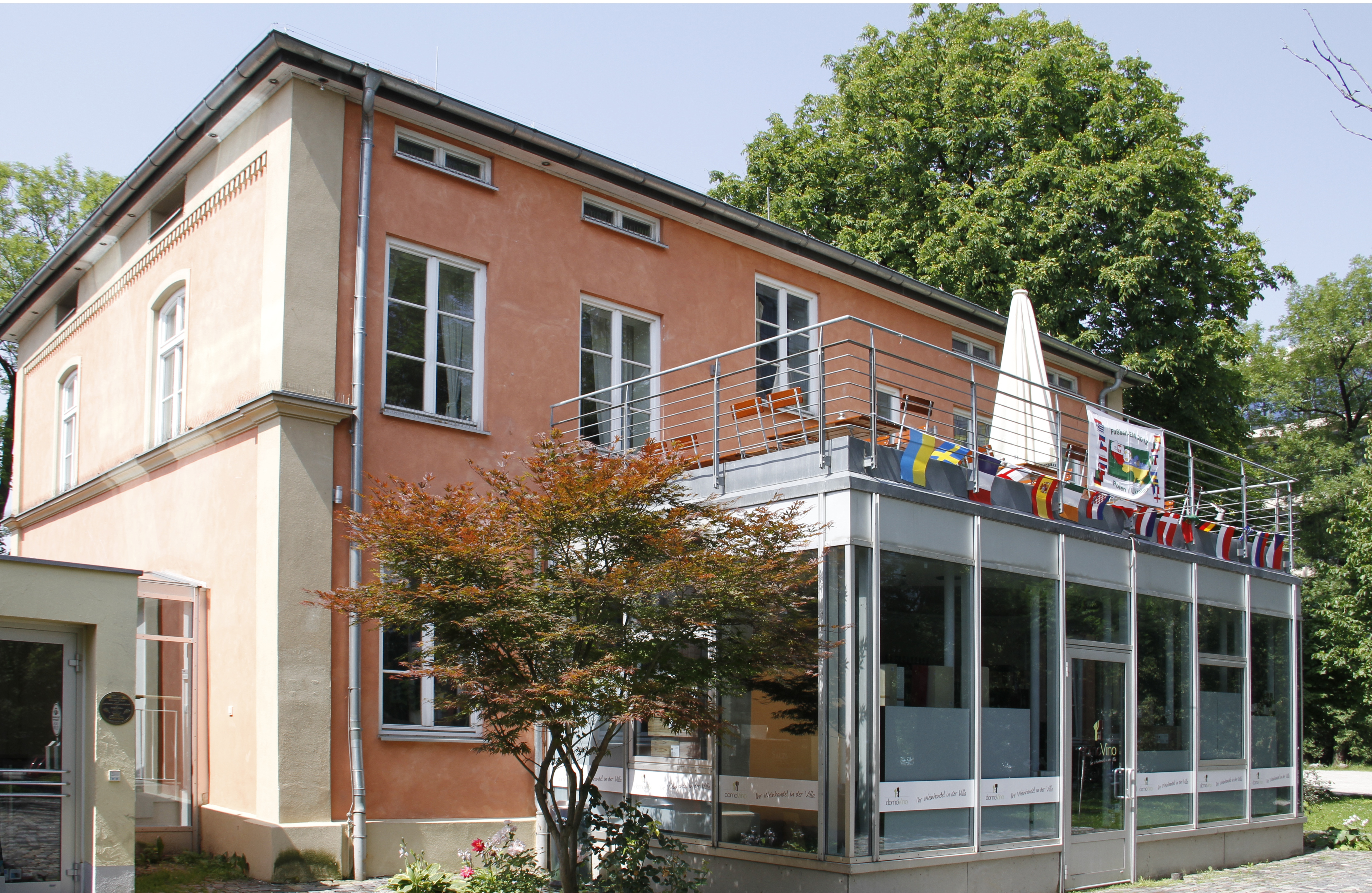 Villa Flora, Hansastraße 44, München, Sendling-Westpark